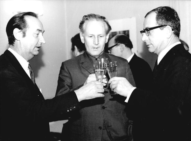 Zentralbild-Sturm St. 28.11.68 Berlin: Prof. Willi Sitte mit dem Käthe-Kollwitz-Preis ausgezeichnet. Der Hallenser Maler und Grafiker Prof. Willi Sitte wurde am 28.11.68 mit dem Käthe-Kollwitz-Preis 1968 der Deutschen Akademie der Künste ausgezeichnet. Ein Toast nach der feierlichen Verleihung des Preises durch den Sekretär der Sektion Bildende Kunst der Akademie der Künste, Prof. Werner Klemke (links) an Prof. Willi Sitte (rechts). (Mitte) Nationalpreisträger Kurt Schwaen, Komponist. Die Auszeichnung fand in den Räumen der Akademie am Robert-Koch-Platz statt.